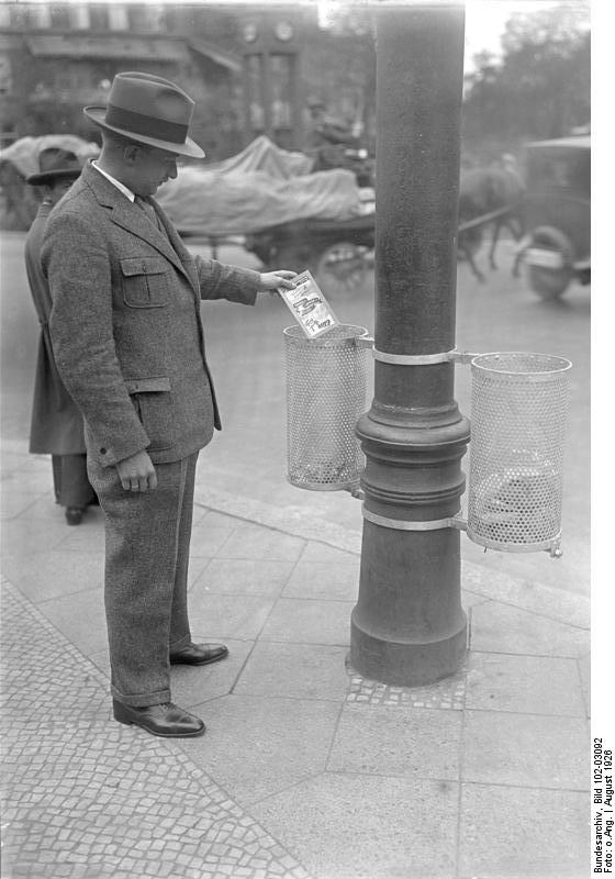 Eine praktische Neuerung im Berliner Strassenleben! Papierkörbe an den Strassenbahnmasten an belebten Plätzen der Großstadt.